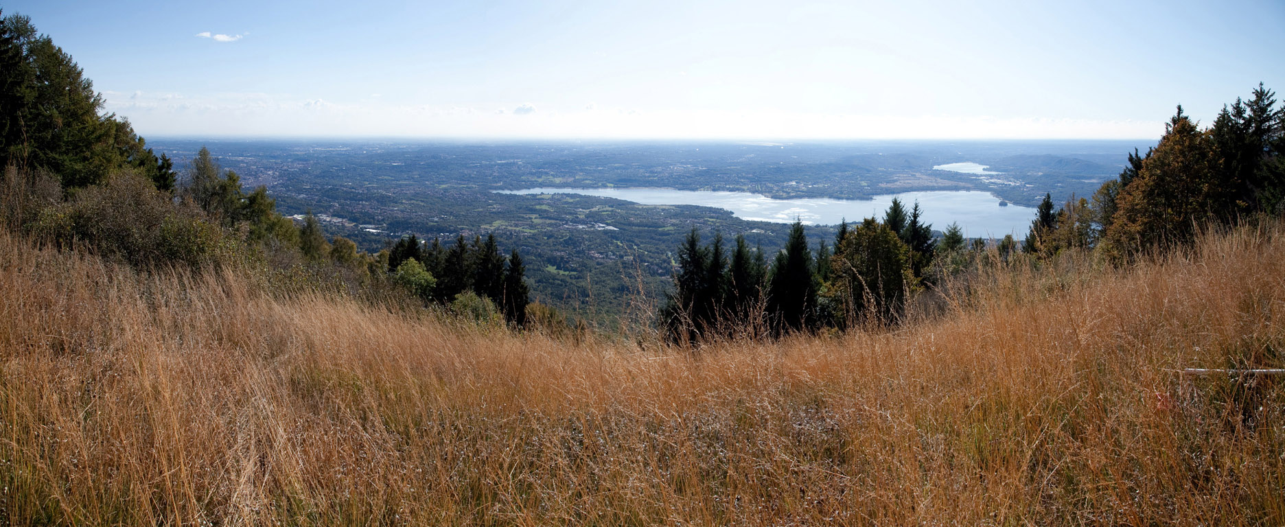 Campo dei Fiore 10/2009